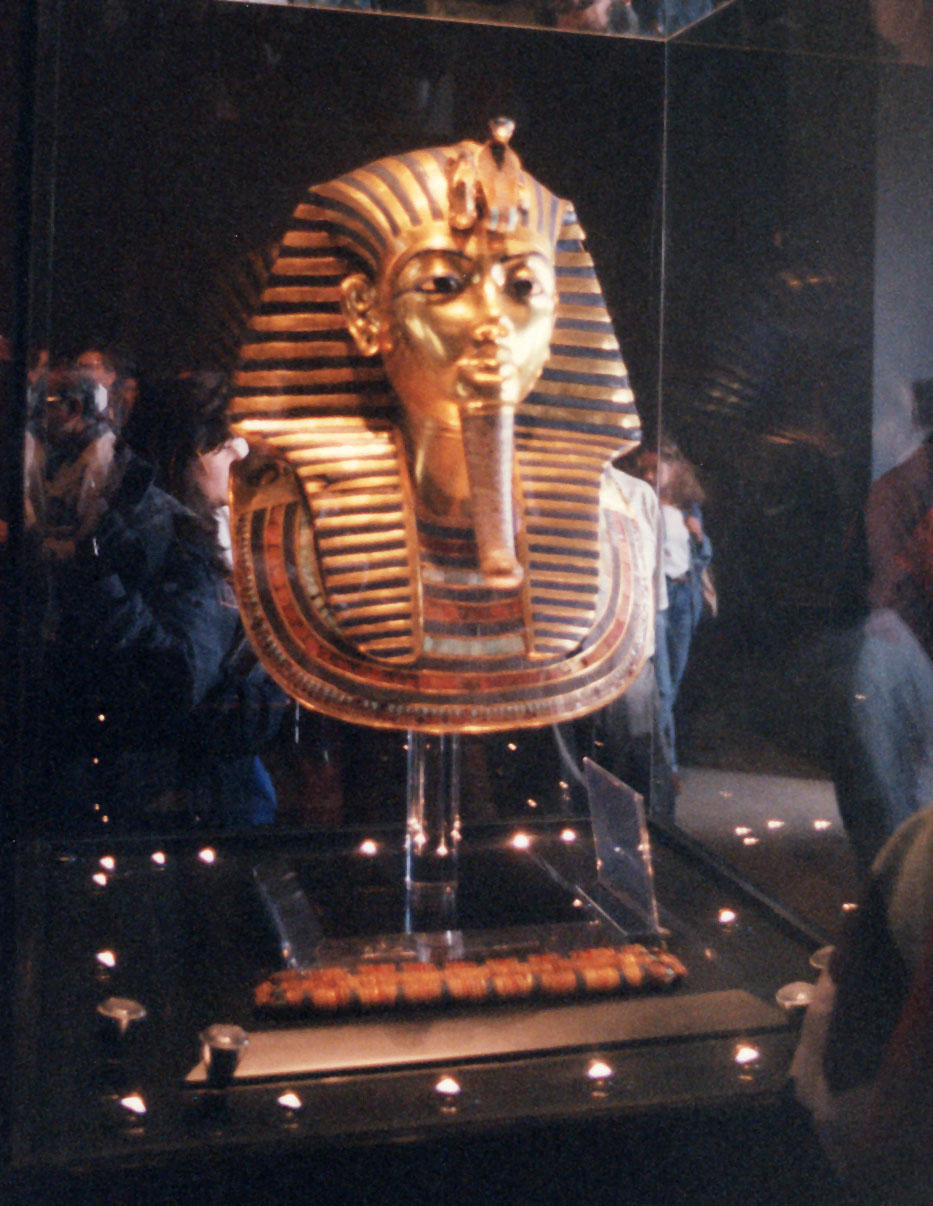 Soggetto: Maschera d'oro di Tutankamon; Autore: Giuseppe (Hotepibre); Data: Dicembre 2000 Museo egizio del Cairo; Località: Museo egizio del Cairo.